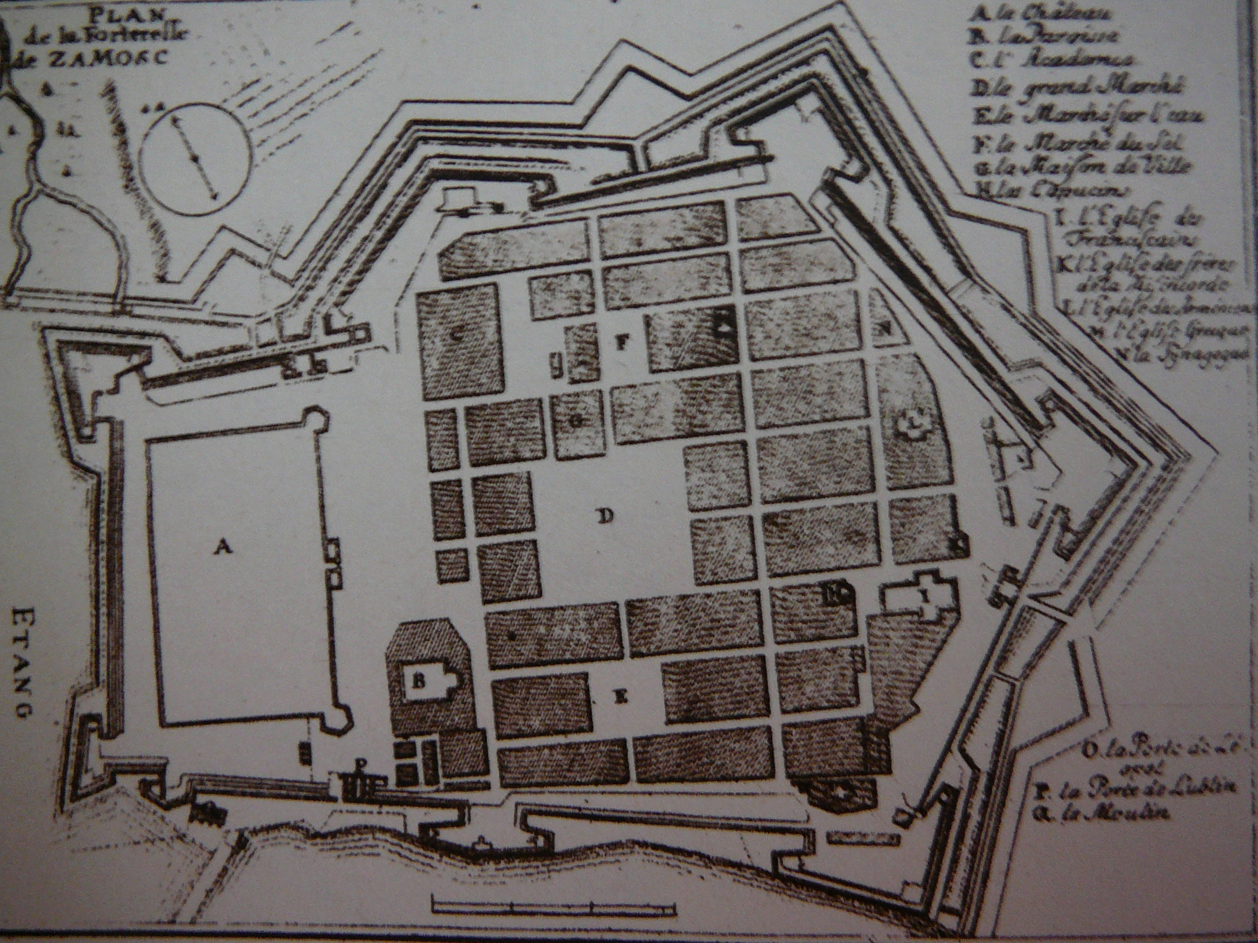 Plan of Zamosc Fortress from mid-17th century Plan Twierdzy Zamość z drugiej połowy XVII w.